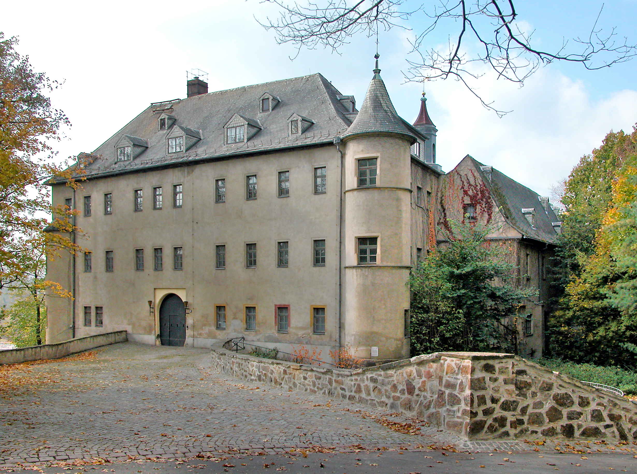 16.10.2007 09350 Lichtenstein Sachsen: Schloß, Torhaus von NO. Gegründet Ende 12. Jh. durch die Herren von Schönburg. 1945 Flüchtlingslager. Von 1949 bis 2000 Alten- und Pflegeheim der Caritas. Verkauf an Prinz Alexander von Schönburg-Hartenstein. Nicht öffentlich zugänglich. [DSCN30786.TIF]20071016505DR.JPG(c)Blobelt